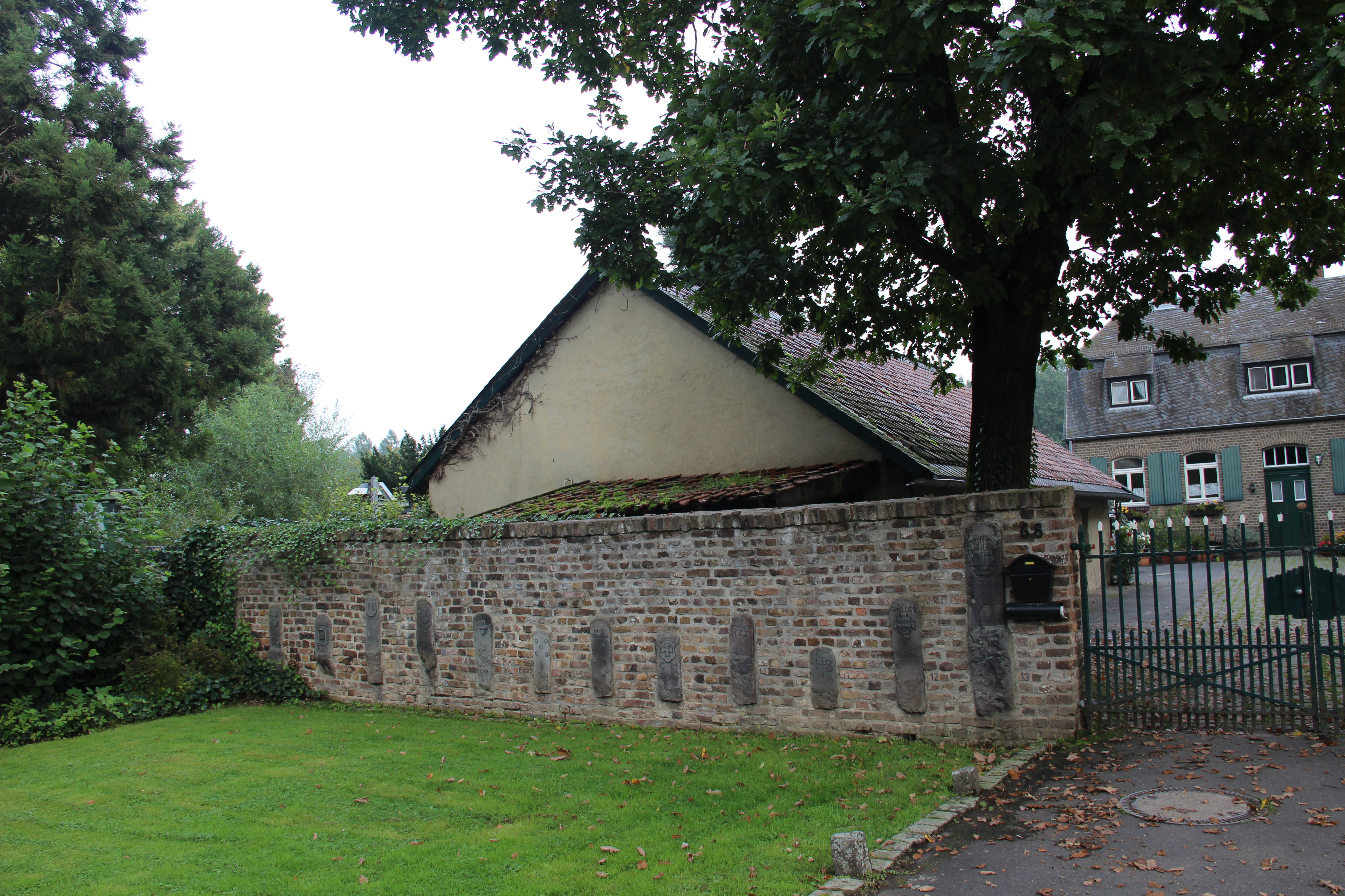 Forstdienstgebäude „Schönwaldhaus“ im Kottenforst, Villiper Allee: Mauer mit mehreren Grenz- und Gütersteinen This is a photograph of an architectural monument. 643